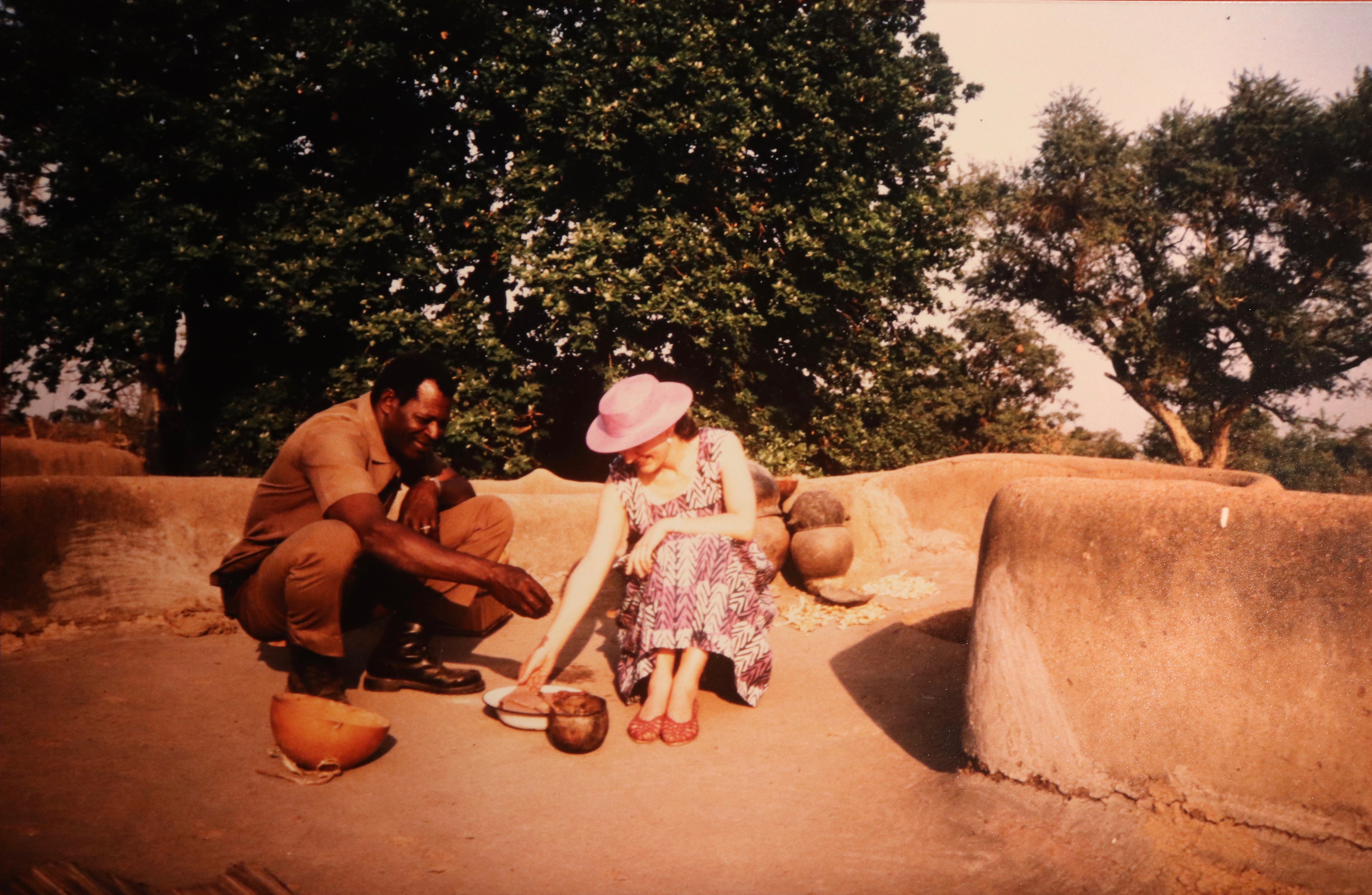 Michèle Cros et Désiré Pooda en 1990